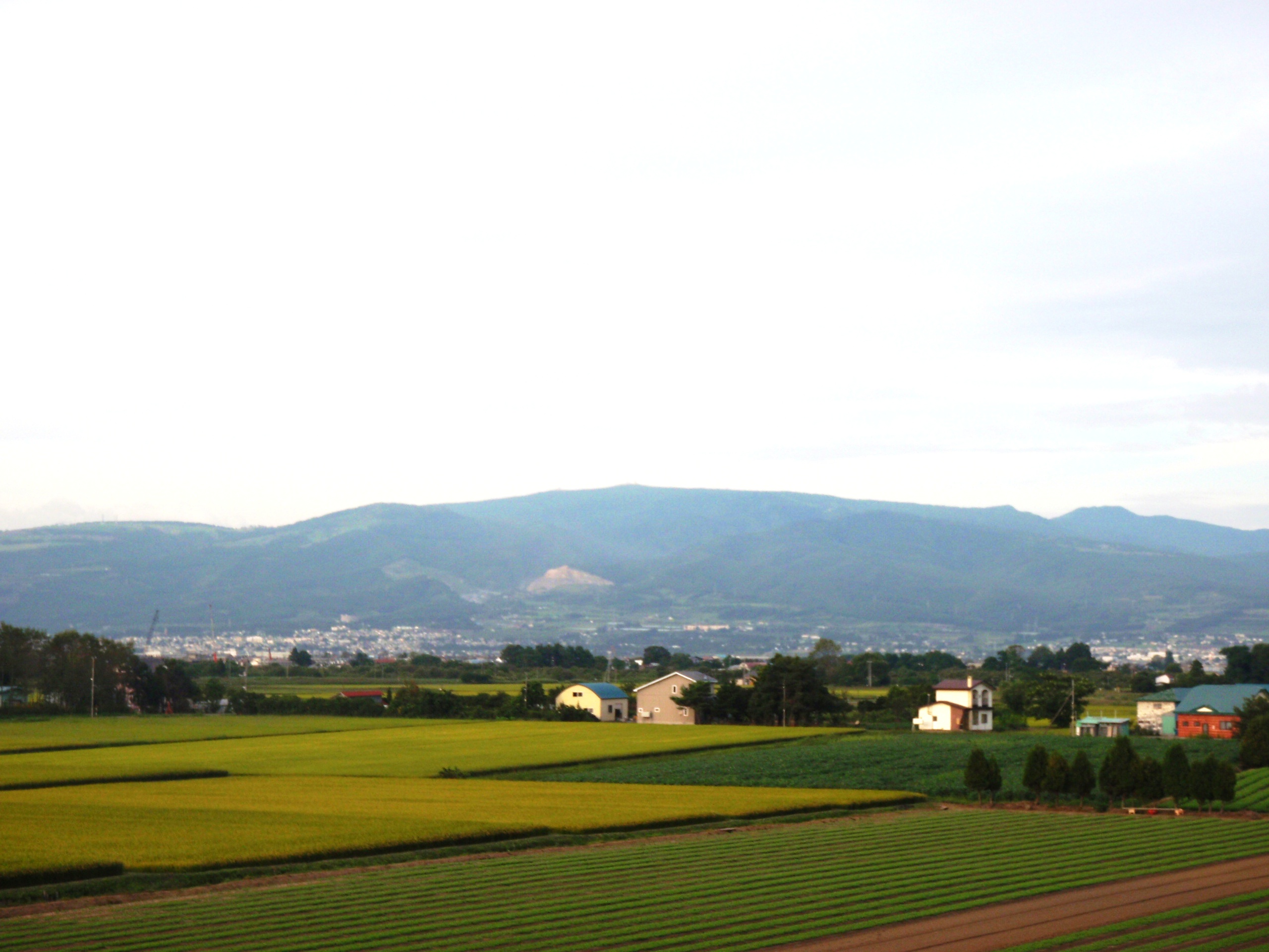 北斗中央IC付近から見た横津岳